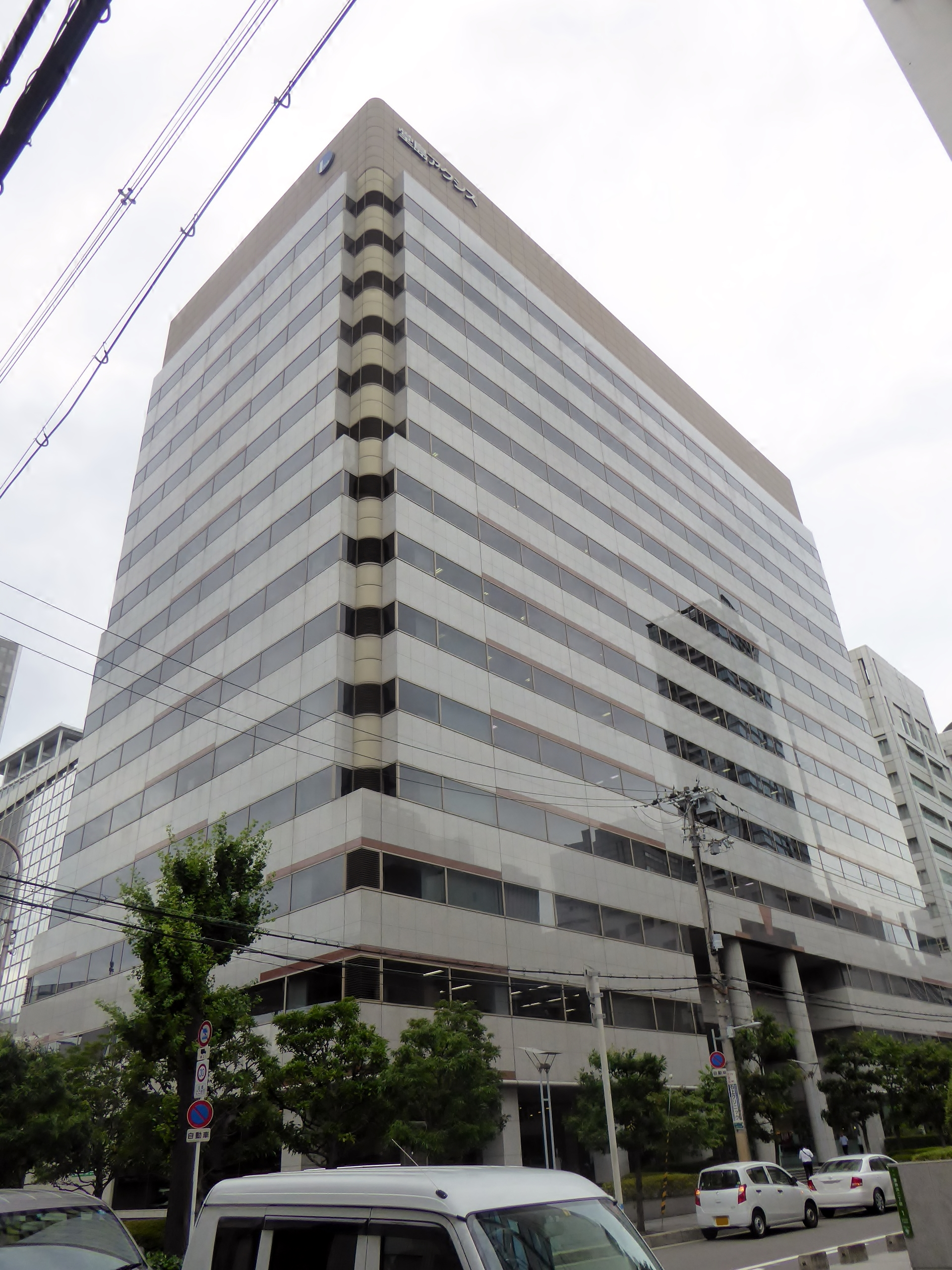 堂島アクシスビルを撮影。